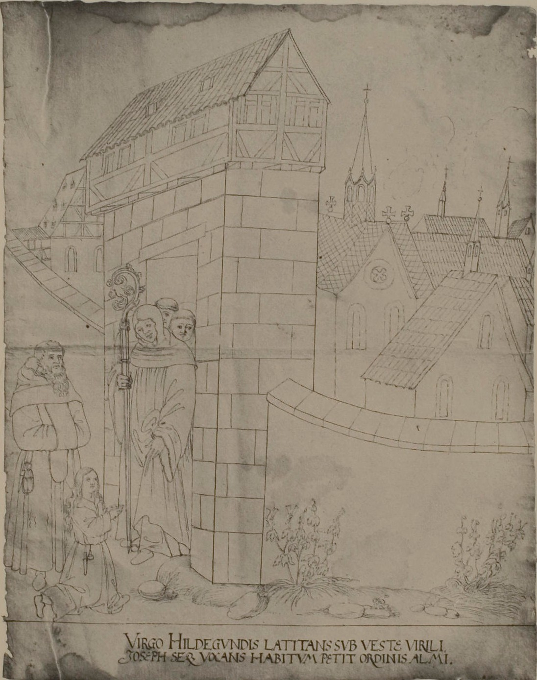 Die Heilige Hildegunde. In: Das Zisterzienserkloster Schönau mit den Zeichnungen des 16. Jahrhunderts aus dem Germanischen Nationalmuseum in Nürnberg Frankfurt/M., 1931. Hrsg. von Herbert Derwein